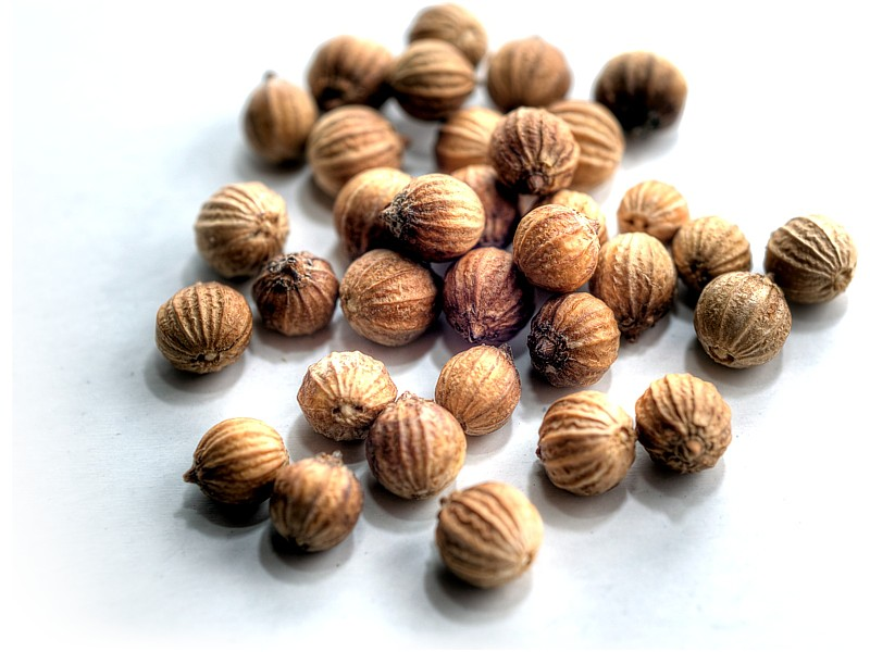 Koriandersamen / Coriander fruit